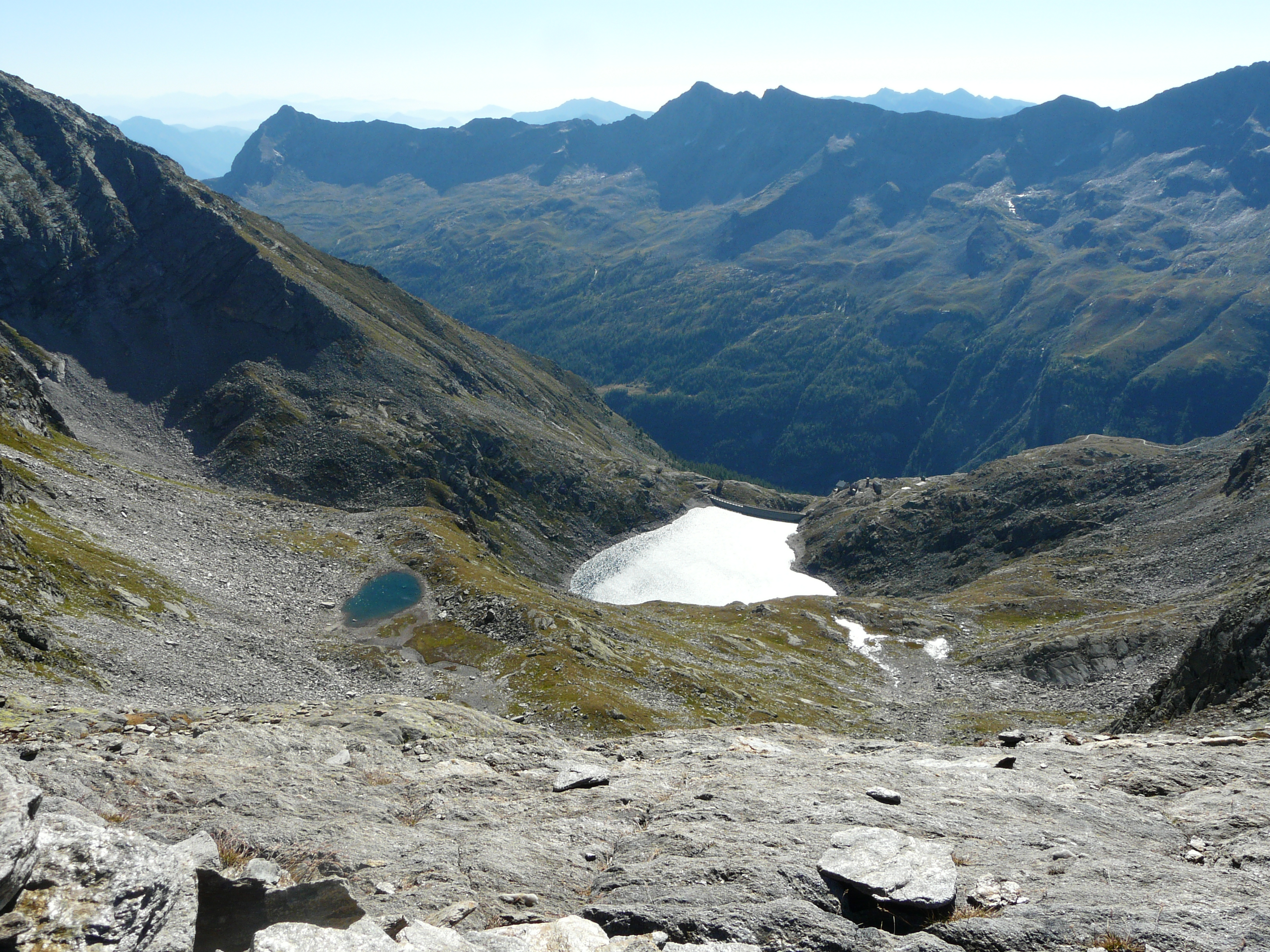 Blick vom Antronapass auf den Lago di Cignino